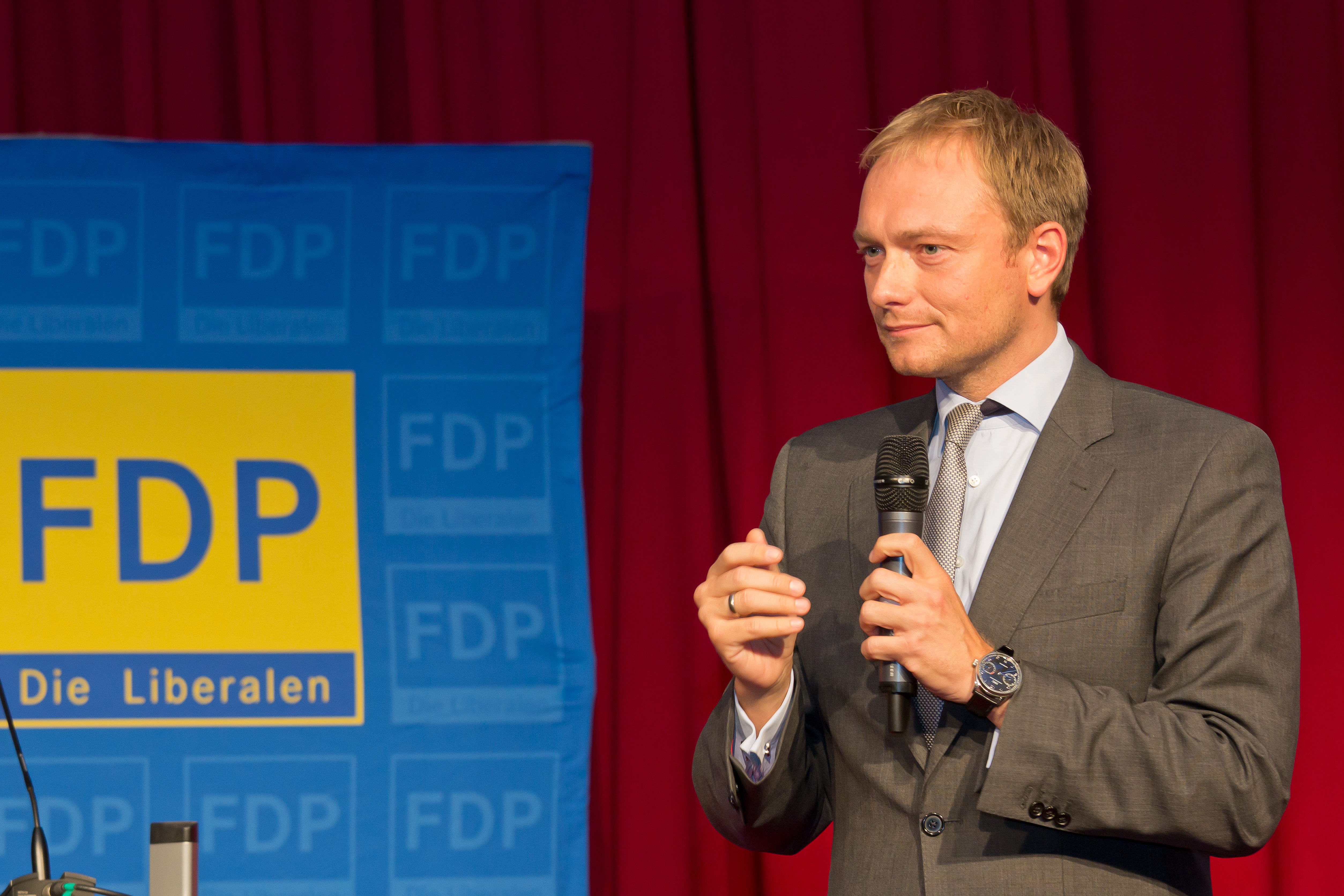 FDP-Wahlkampfkundgebung in der Wolkenburg Köln. Im Bild: Spitzenkandidat Christian Lindner